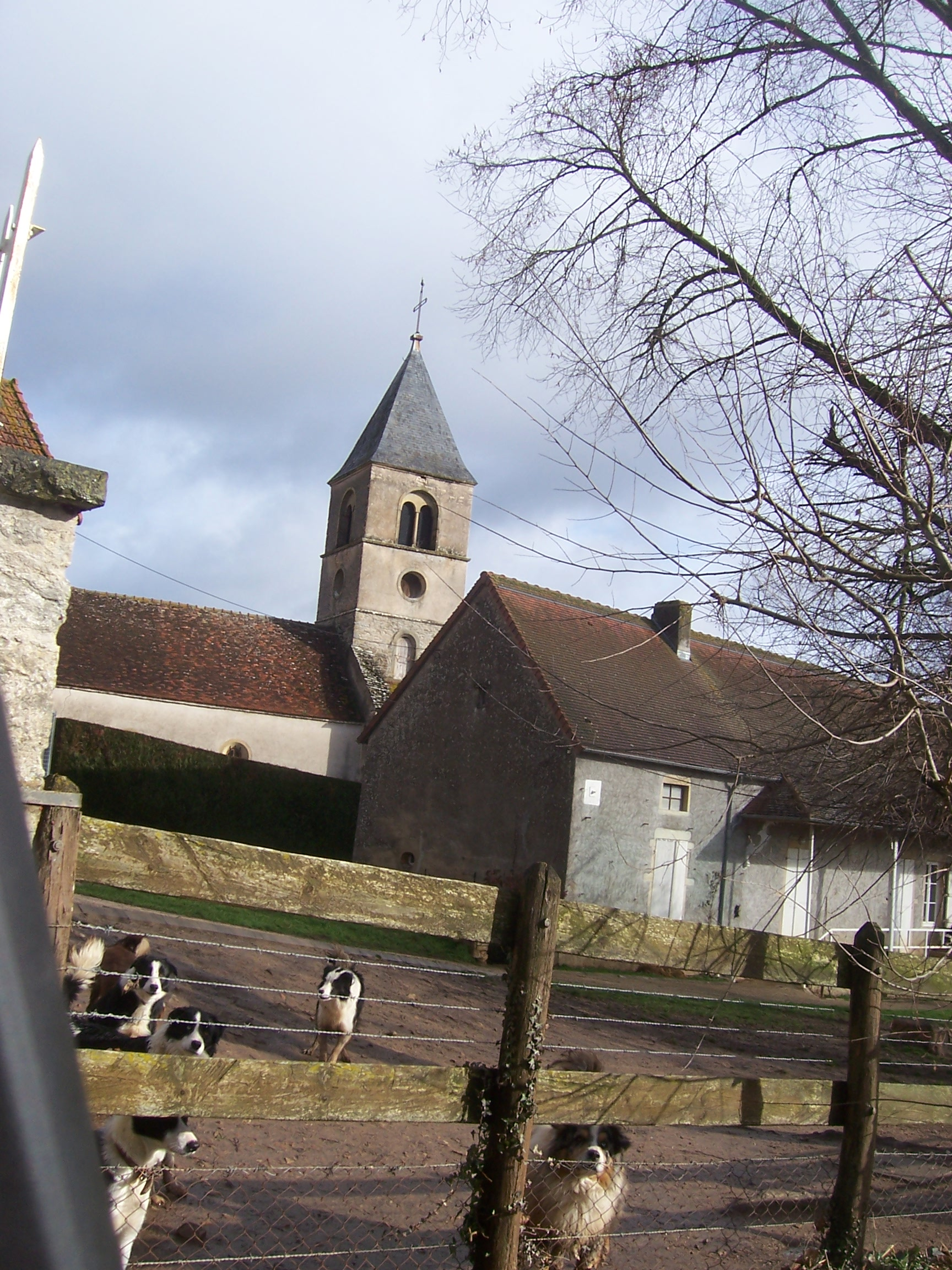 Collonges-en-Charollais